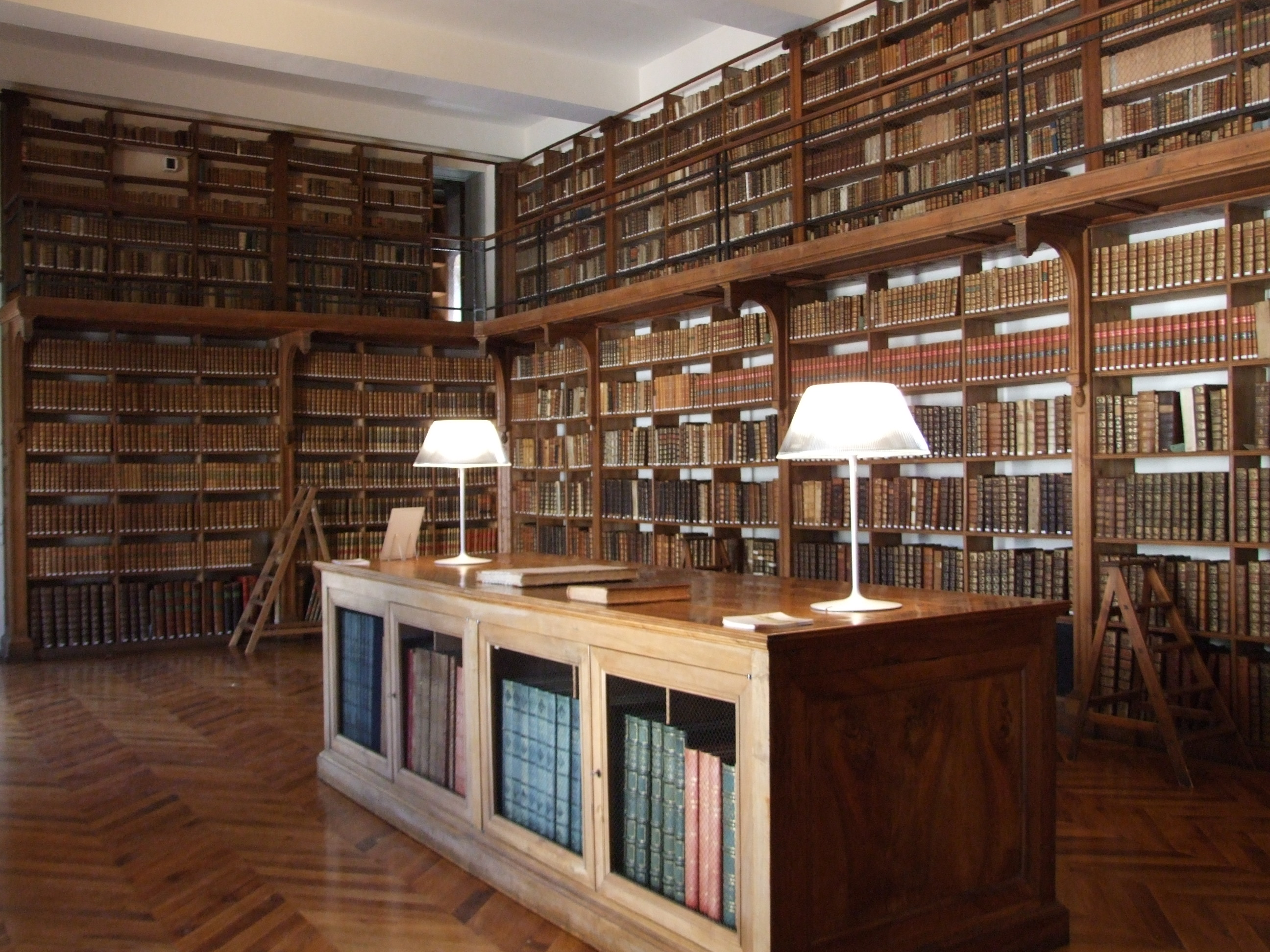 Bibliothèque municipale, Salle Boullemier, Dijon, Côte-d'Or, Bourgogne, FRANCE